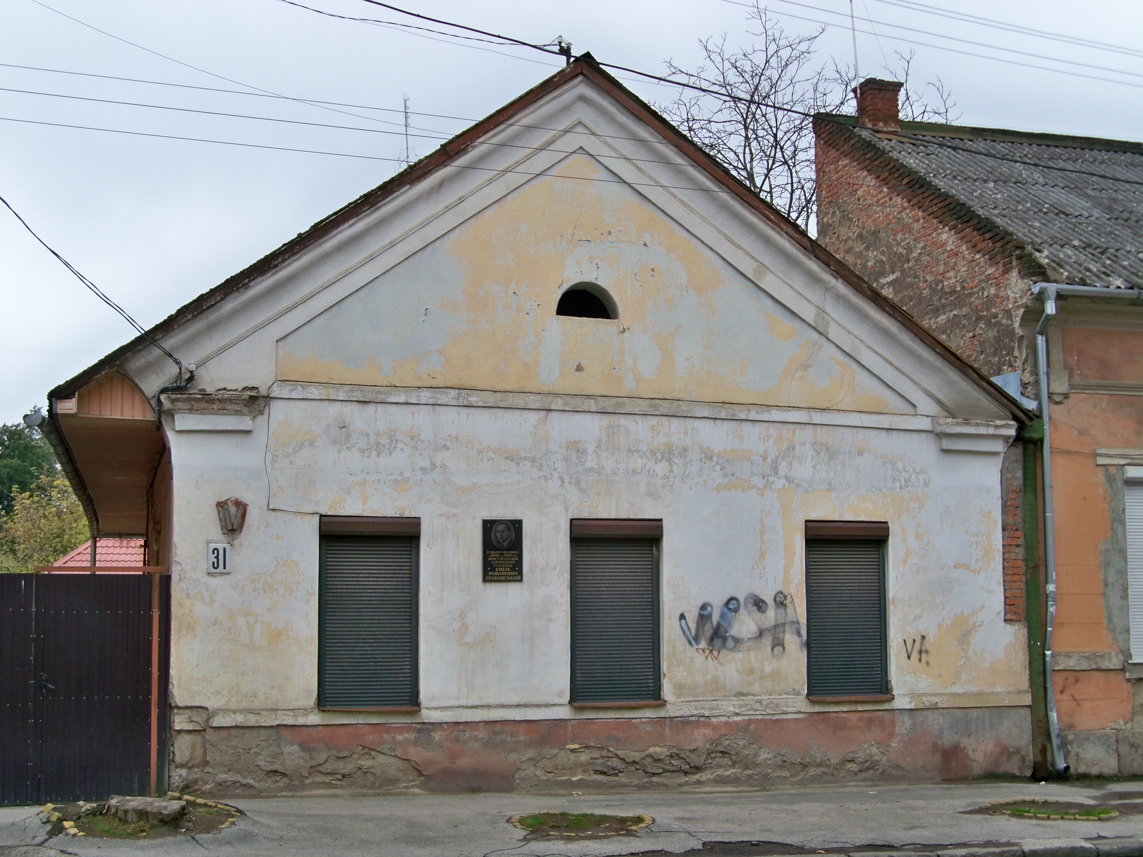 Будинок, в якому жив і працював Закарпатський художник Е.Р. Грабовський, Ужгород, вул. Собранецька, 31